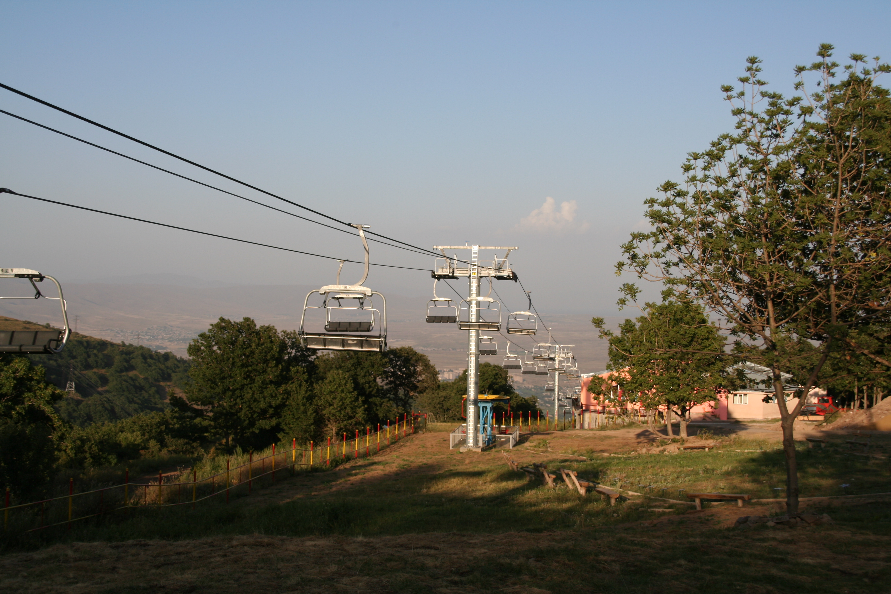 Tsarghgadzor en été